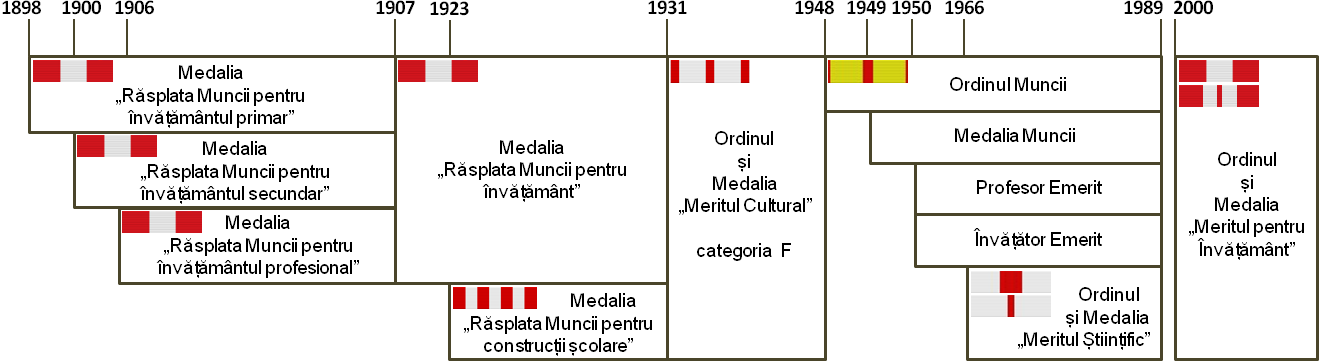 Evolutia distinctiilor în învatamânt